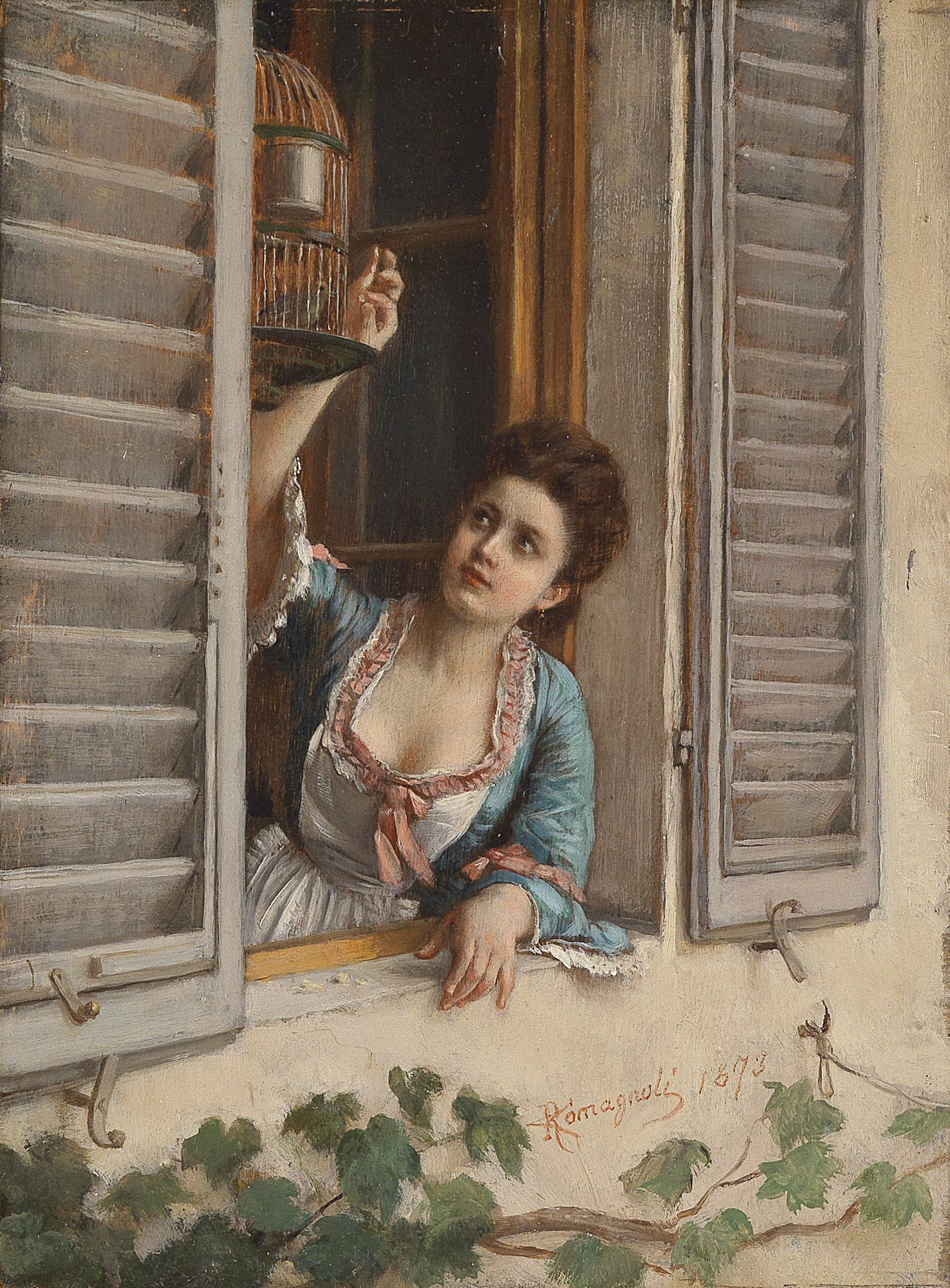 Der kleine Liebling